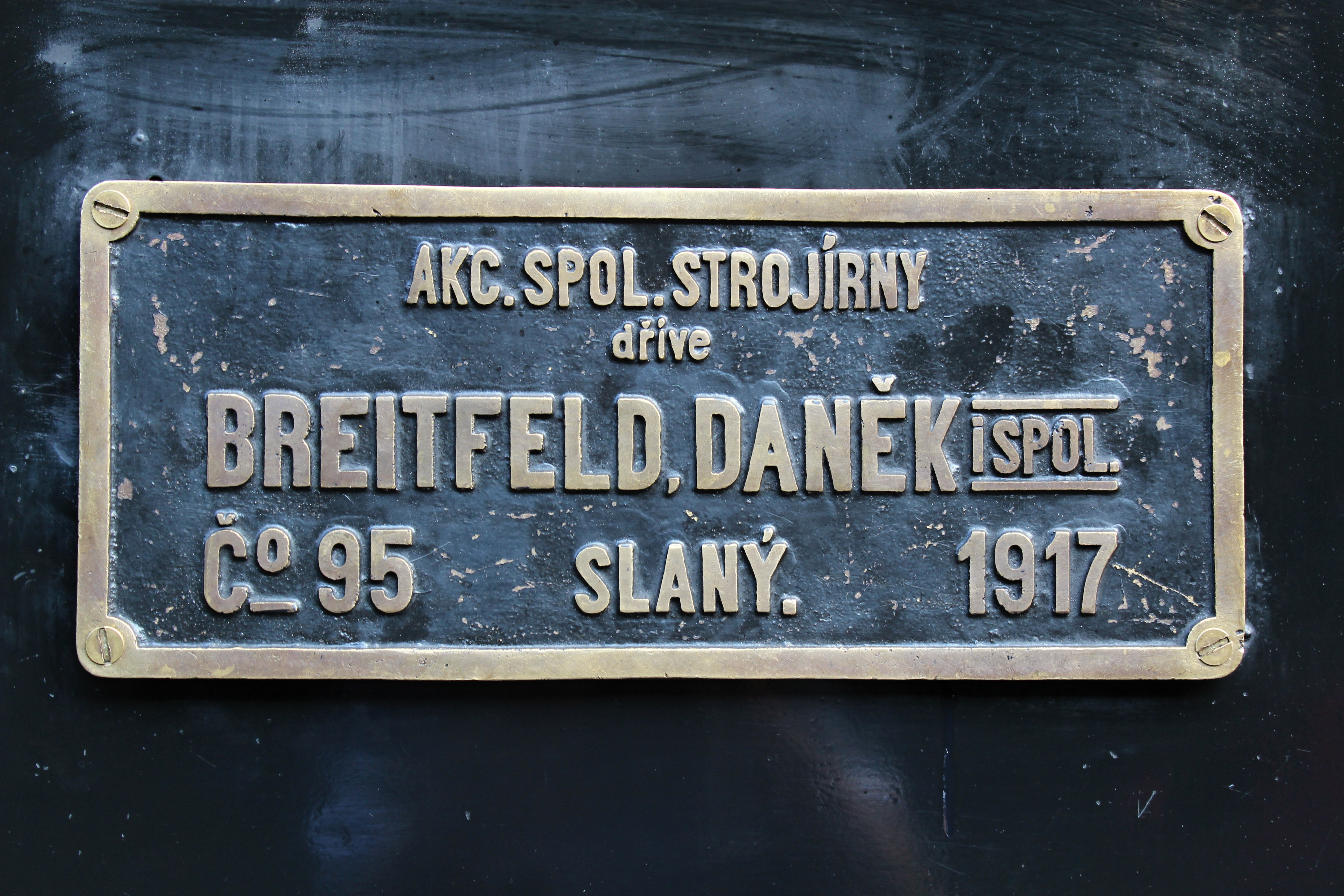 Parní lokomotiva 4342186 – Čtyřkolák před nostalgickou jízdou na nádraží Praha – Braník 30. 8. 2014 v 8.57 nostalgická jízda na trati Praha – Braník – Čerčany a zpět. Číslo stroje: 4343186 – na kotli ČSD 4342186 – na boku Údaje na originálním výrobním štítku: Výrobce: Akc. spol. strojírny dříve BREITFELD, DANĚK i spol. Slaný Č.: 95 Rok výroby: 1917 Provozovatel: Pražská dráha Depo Vršovice Více na